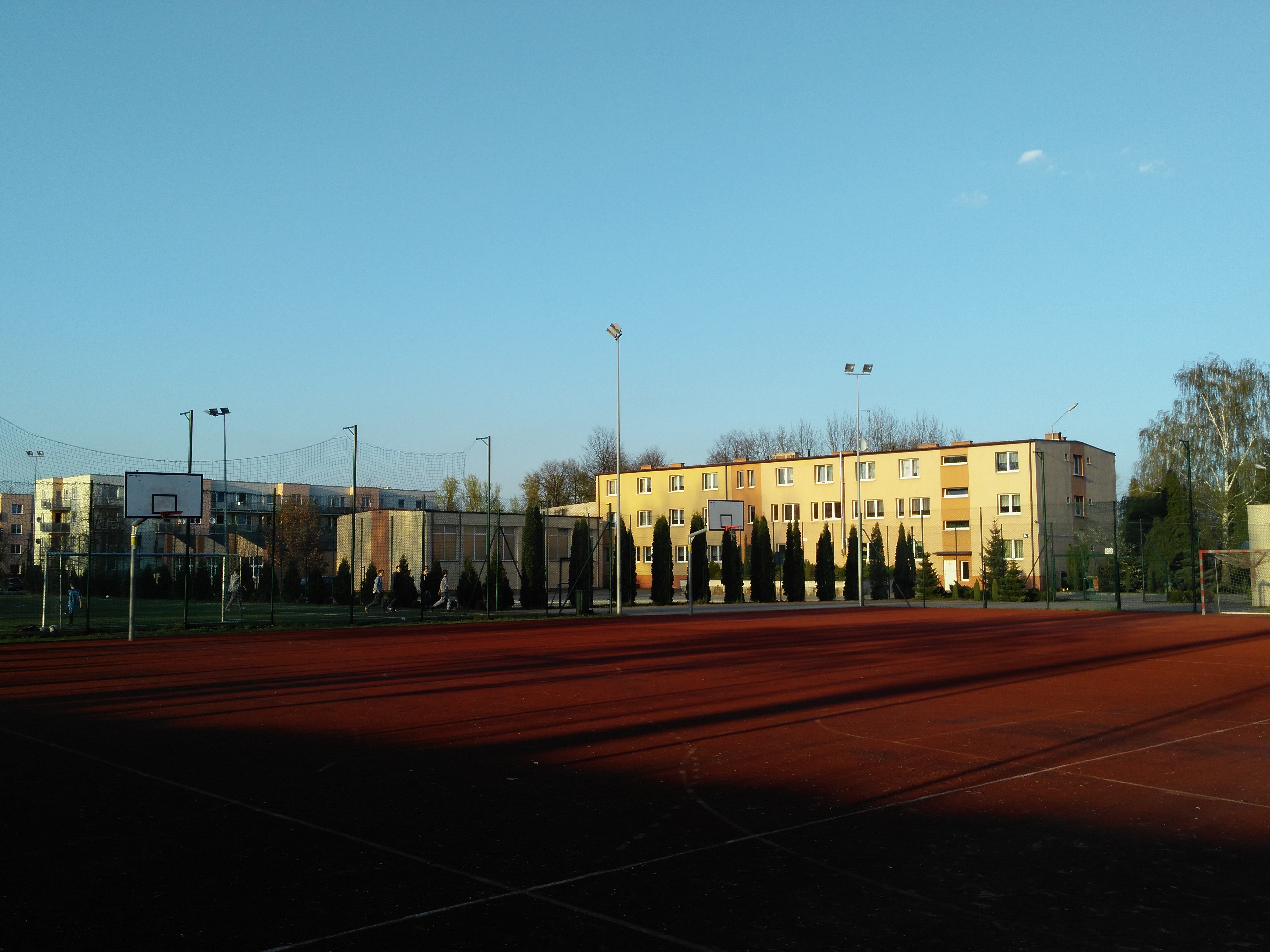 Specjalny Ośrodek Szkolno - Wychowawczy im. Marii Grzegorzewskiej przy Majowej w Tomaszówie Mazowieckim, kwiecień 2015 roku.